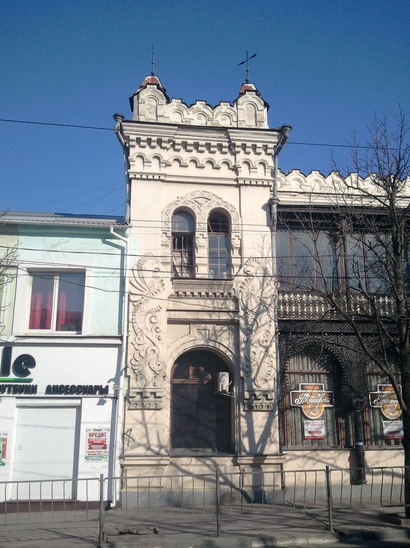 Повреждения северного фасада (со сторону проспекта Кирова). Повреждены окна и крыша.